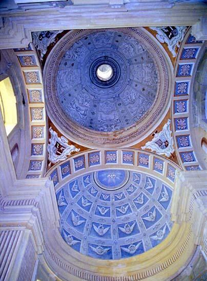 Kaplica na zamku Lubomirskich, Nowy Wiśnicz